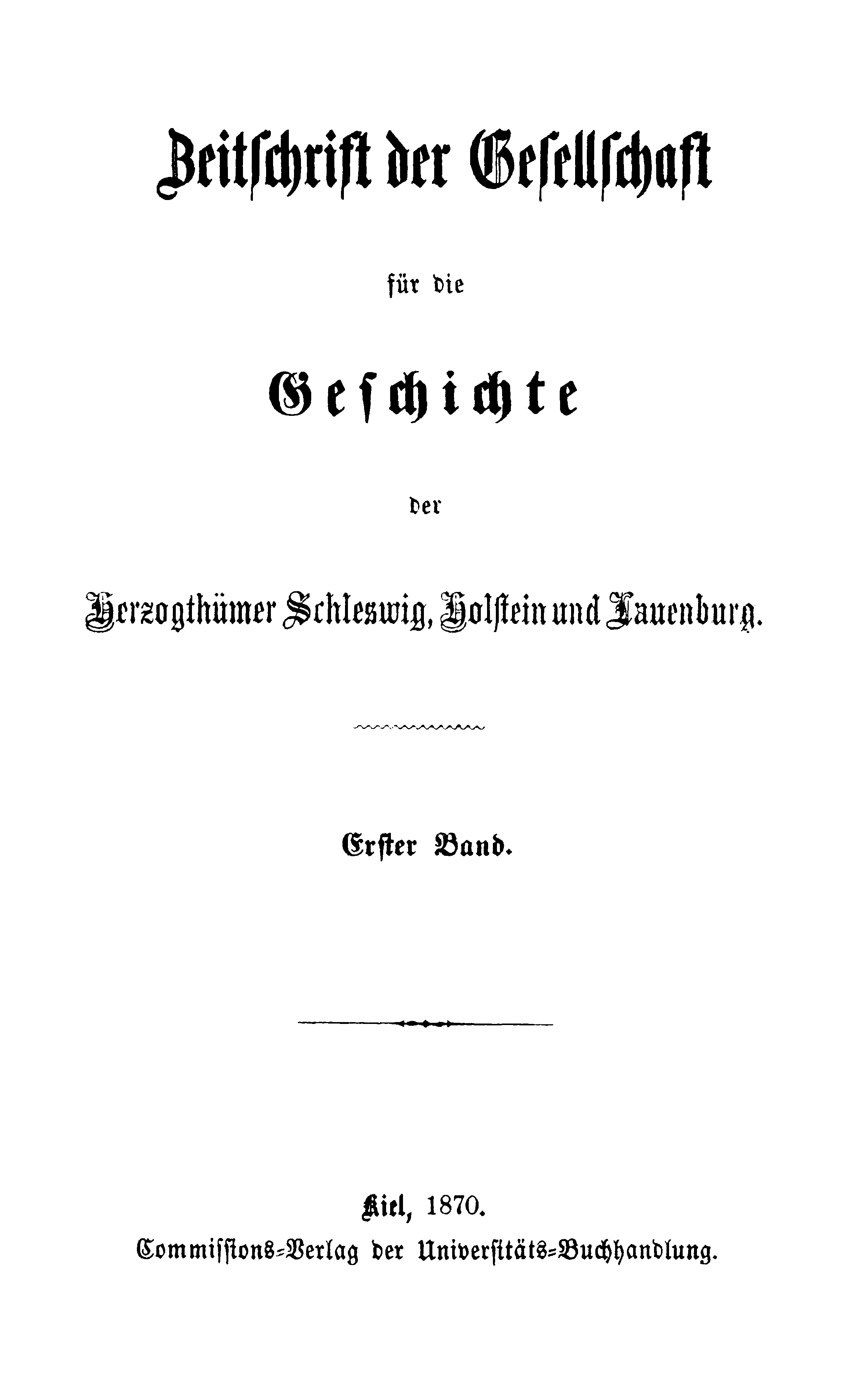 Titelseite der Zeitschrift / Title page of the periodical